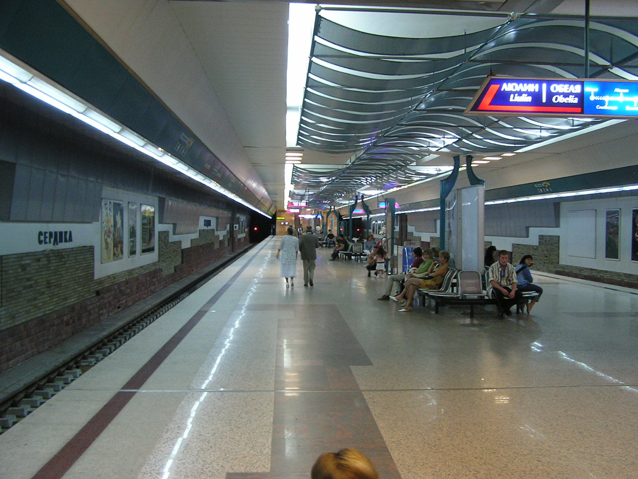 Serdika subway station in Sofia, Bulgaria